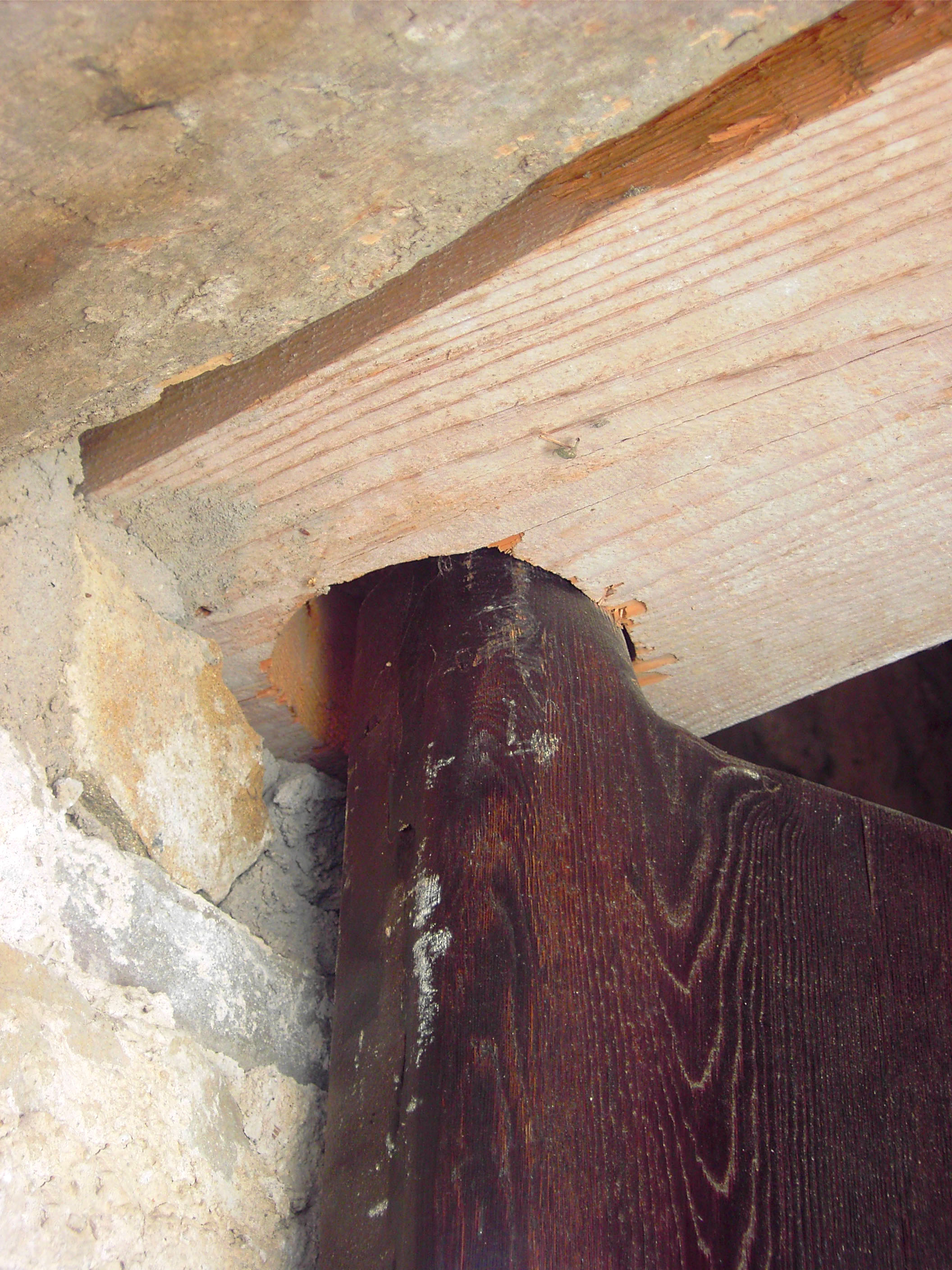 Aragonés: Chugadero de currón en una puerta.